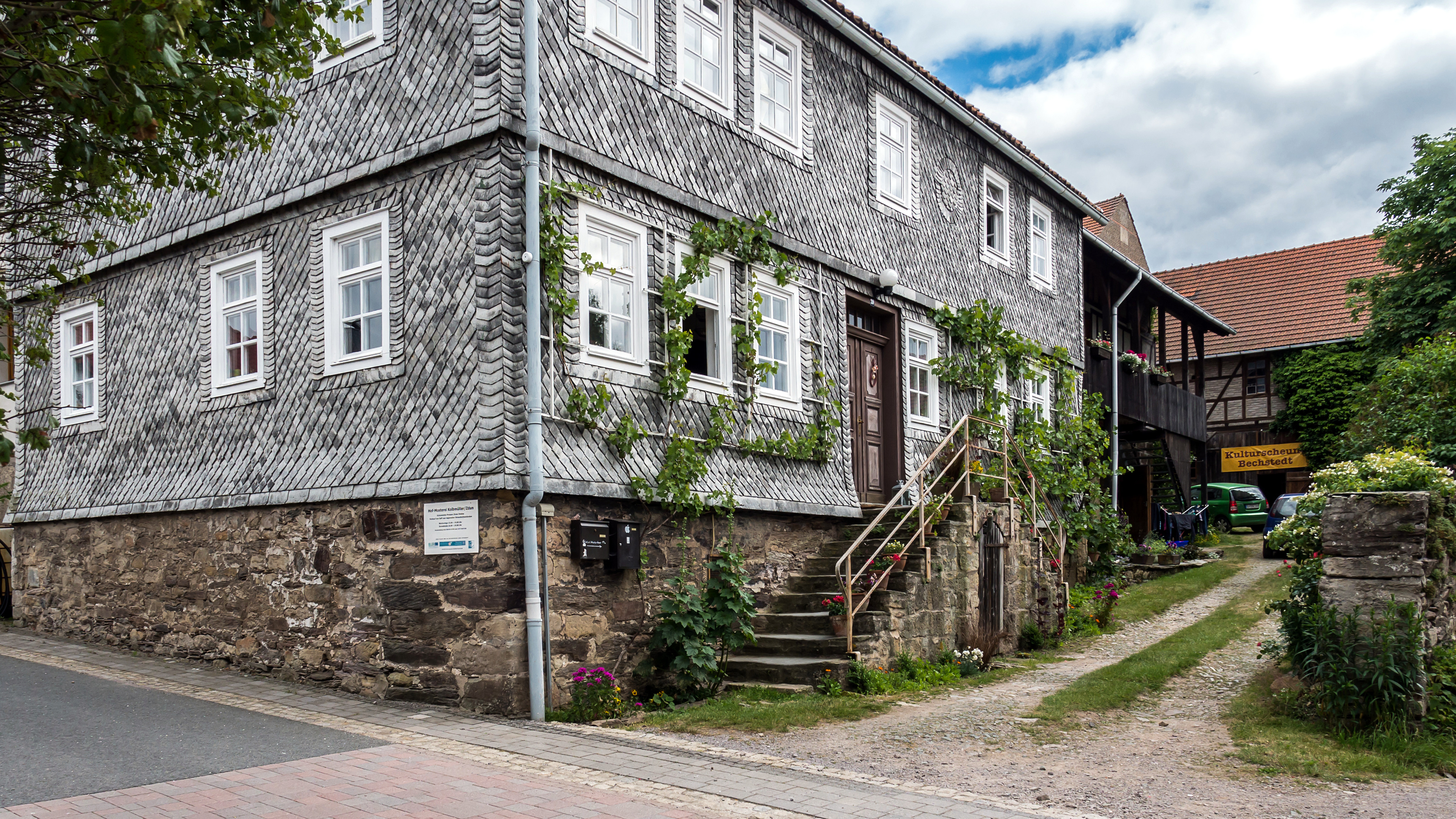 Kulturdenkmal in Bechstedt Gehöft "Bestandteil Denkmalensemble Scheunenreihe"Ortsstraße 21 ,Landkreis Saalfeld-Rudolstadt